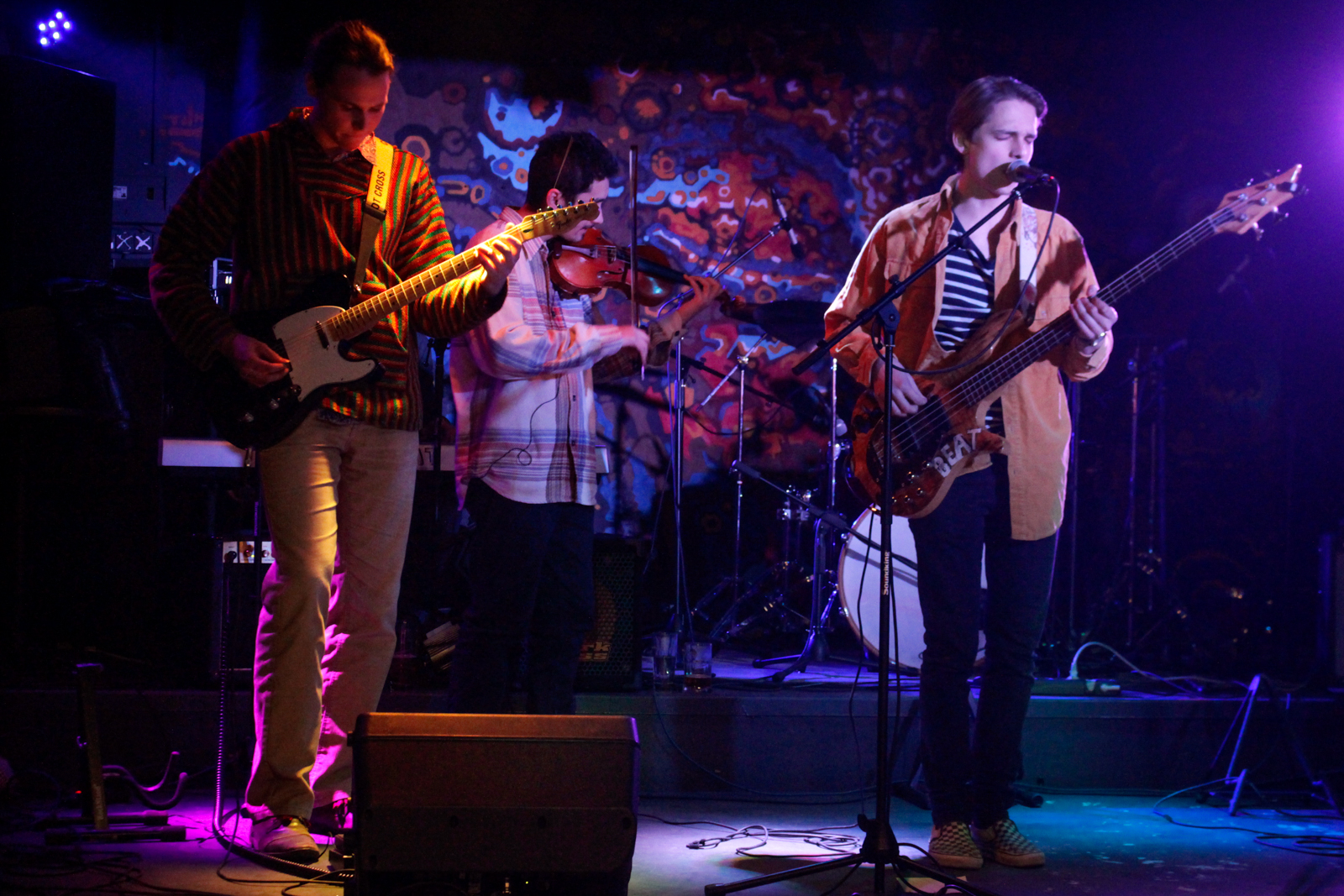 členovia hudobnej skupiny The Bluebeat